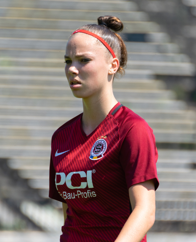 Andrea Stašková vs Slavia Praha (women)